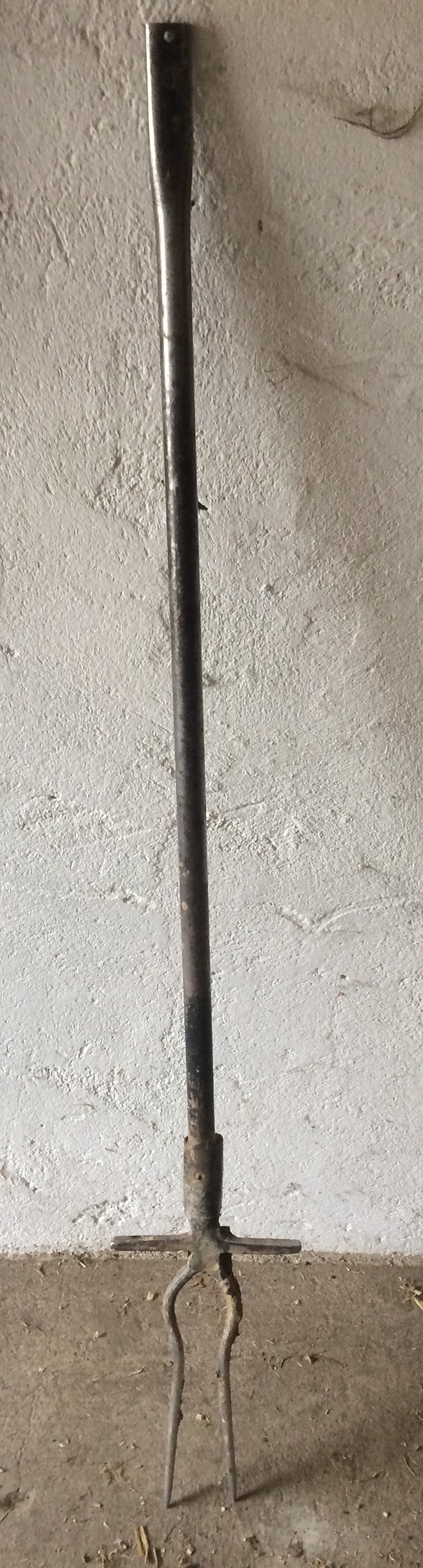 Auf dem Foto sieht man eine Ampfergabel, die stehend vor der Wand einer Garage fotografiert wurde. Sie besitzt einen metallenen, schwarz lackierten Stiehl und die für eine Ampfergabel charakteristischen Zinken.